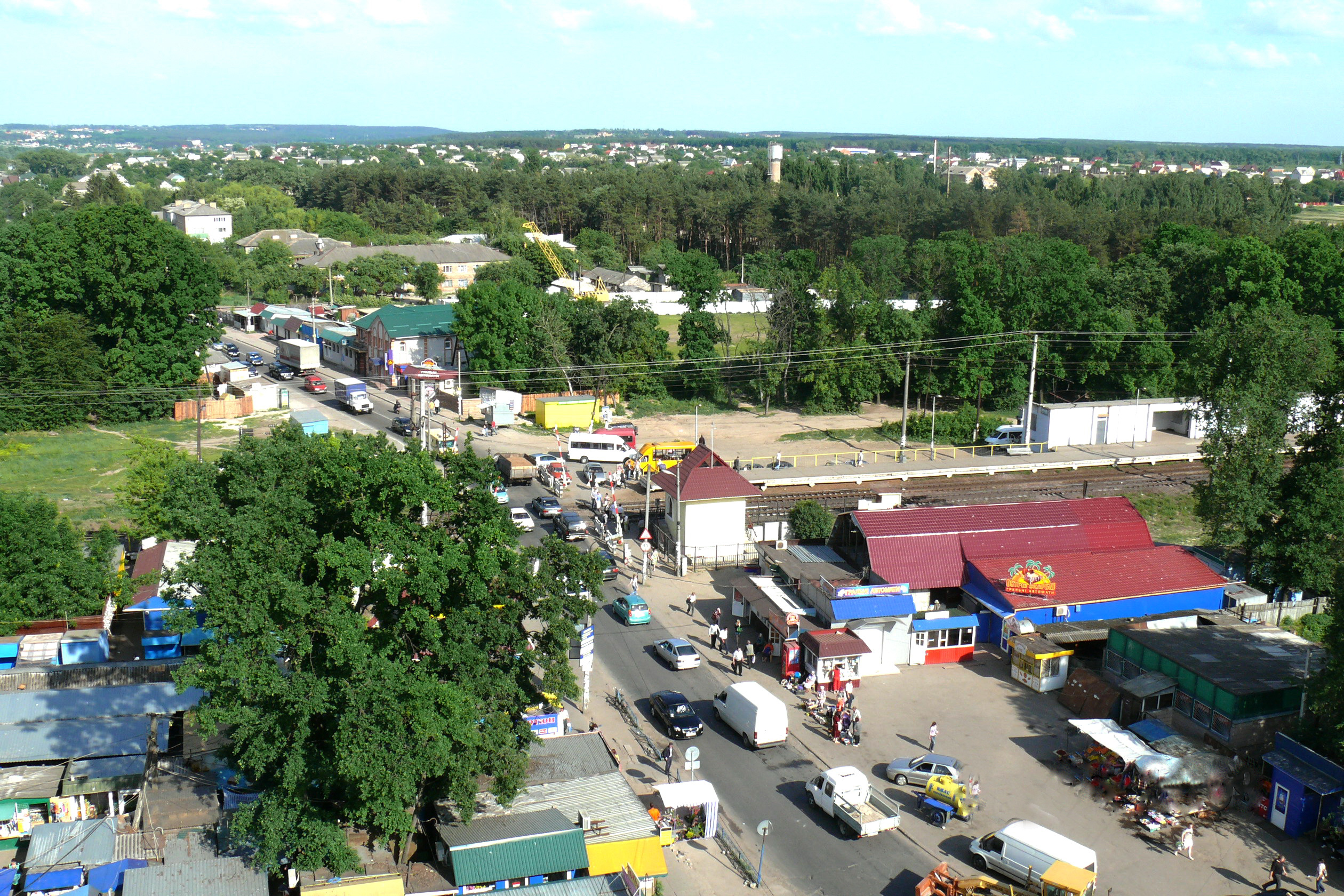 Тарасовка. Железнодорожный переезд у о.п.Тарасовка. Вид со здания по ул. Маяковского, 2 в Боярке.